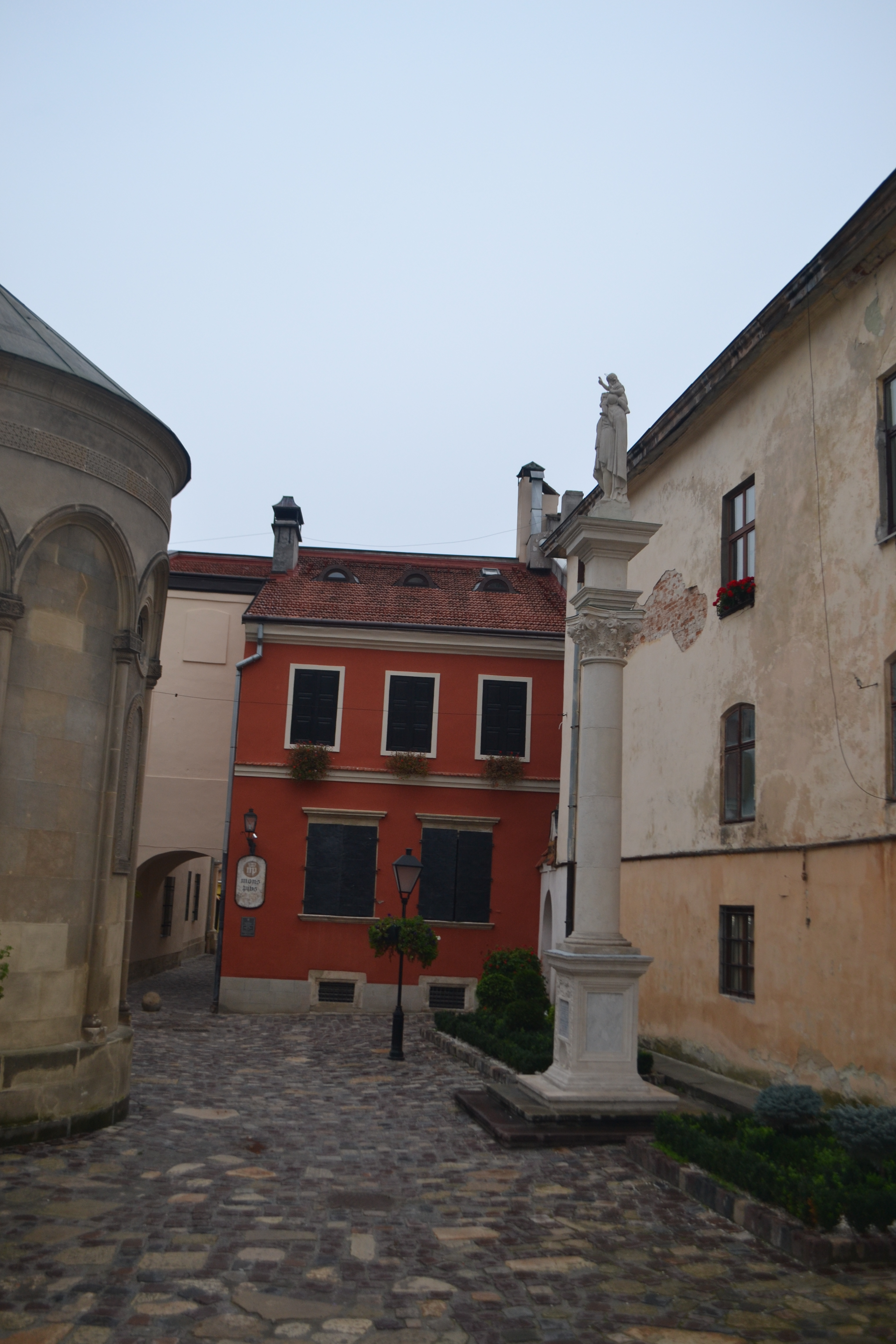 Вірменський собор - Колона Св. Христофора, Львів, Вірменська вул., 7/9